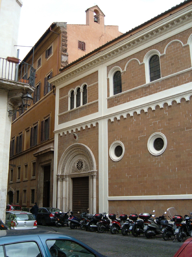 Chiesa di San Tommaso di Canterbury, a Roma, nel rione Regola. Foto personale.